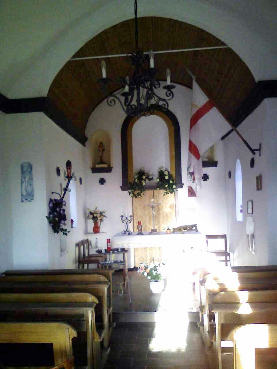 Cappella del Beato Jacopo da Varagine in Varazze (Italy)